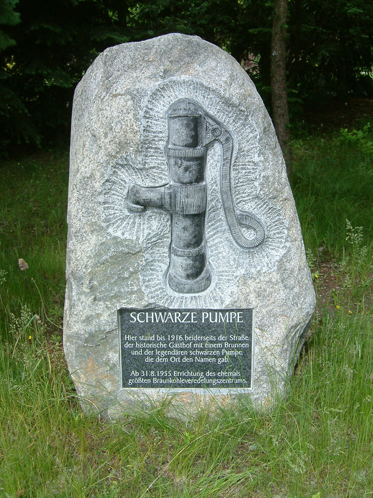 Gedenkstein für den "Gasthof zur Schwarzen Pumpe" in Schwarze Pumpe.